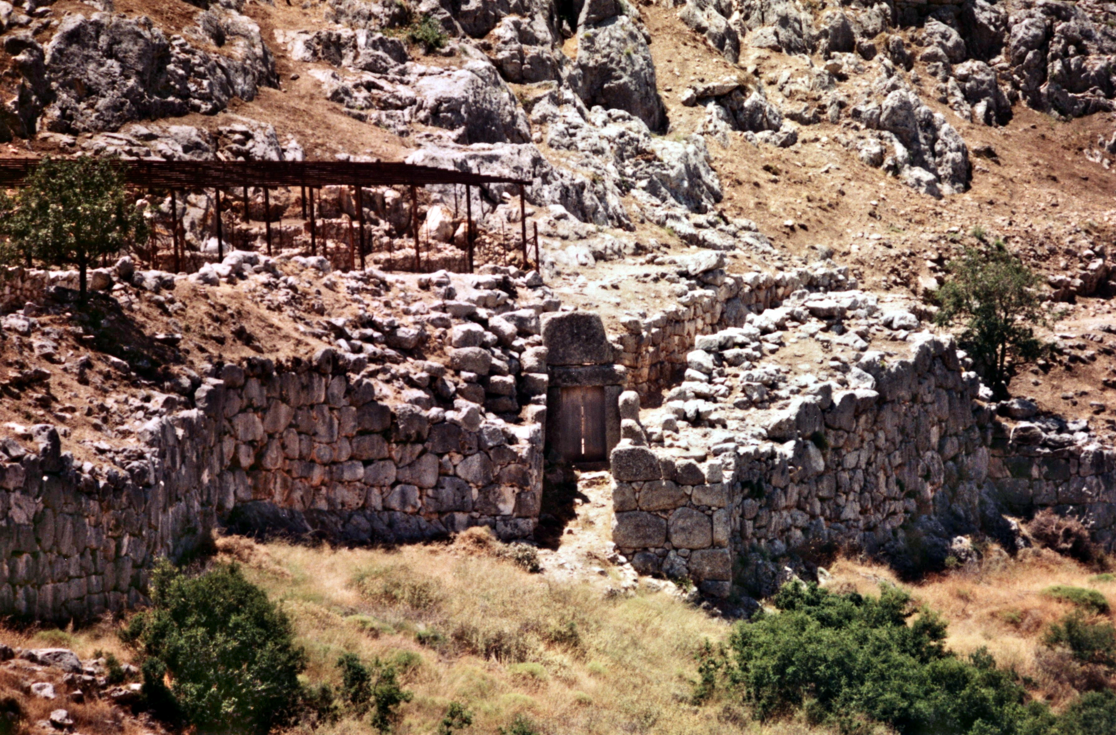 Μυκήνες, λεπτομέρεια των τειχών της Ακρόπολης.«Μυκήνες»